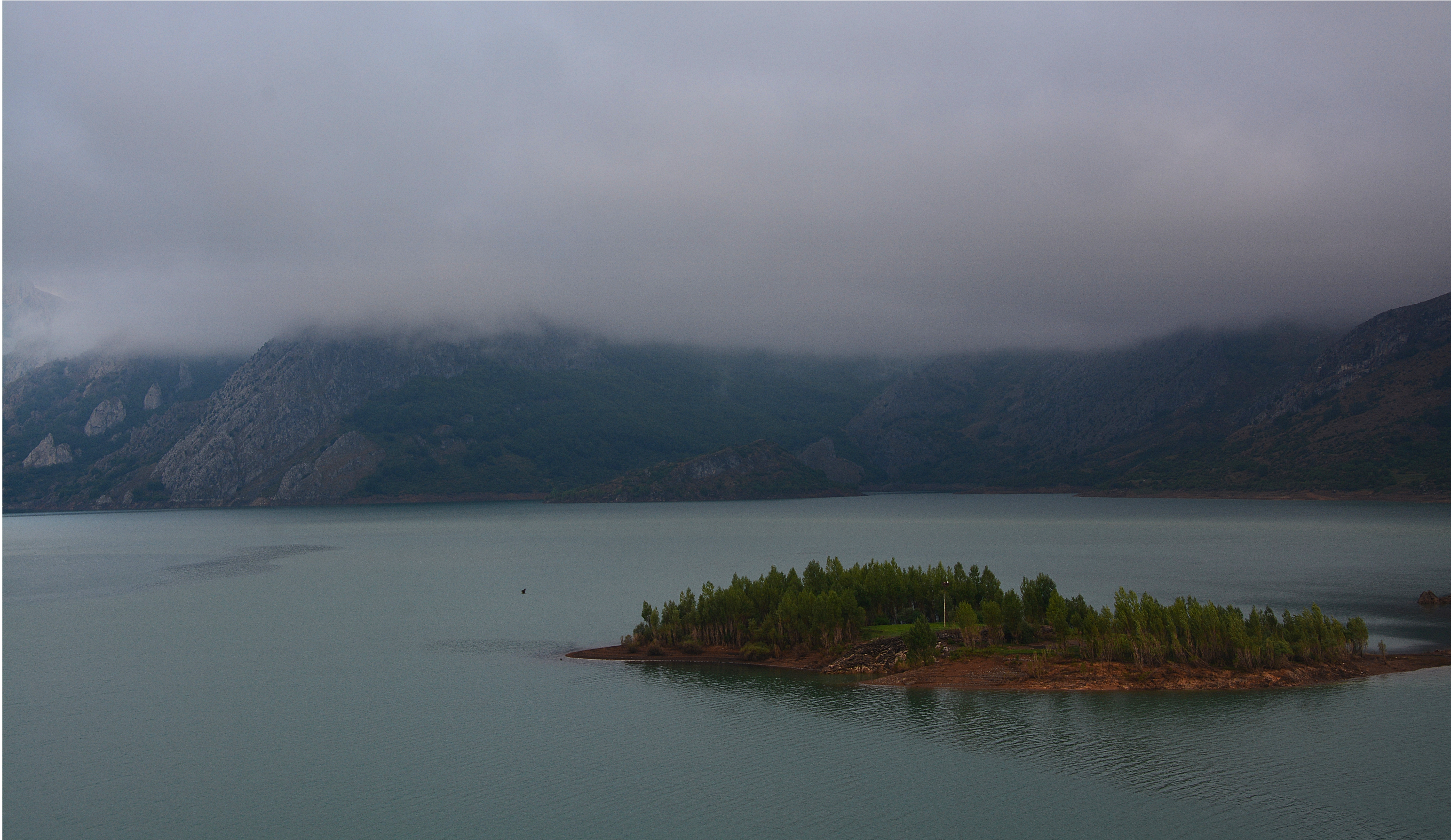 Embalse de Riaño, provincia de León, Castilla y León, España.